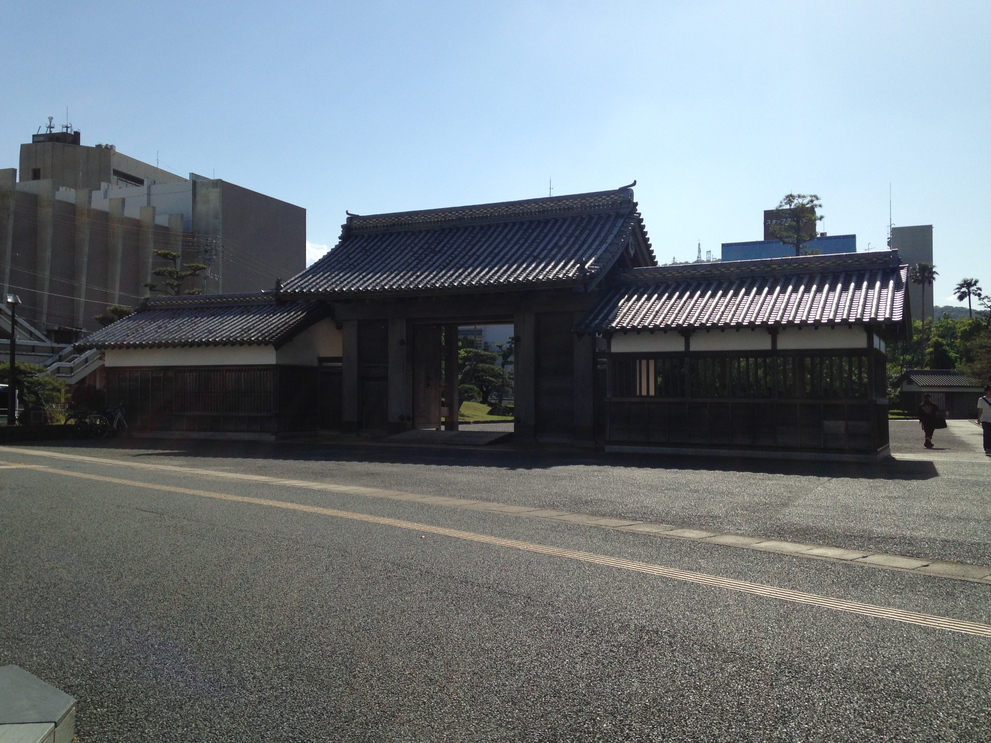 徳島城の鷲の門